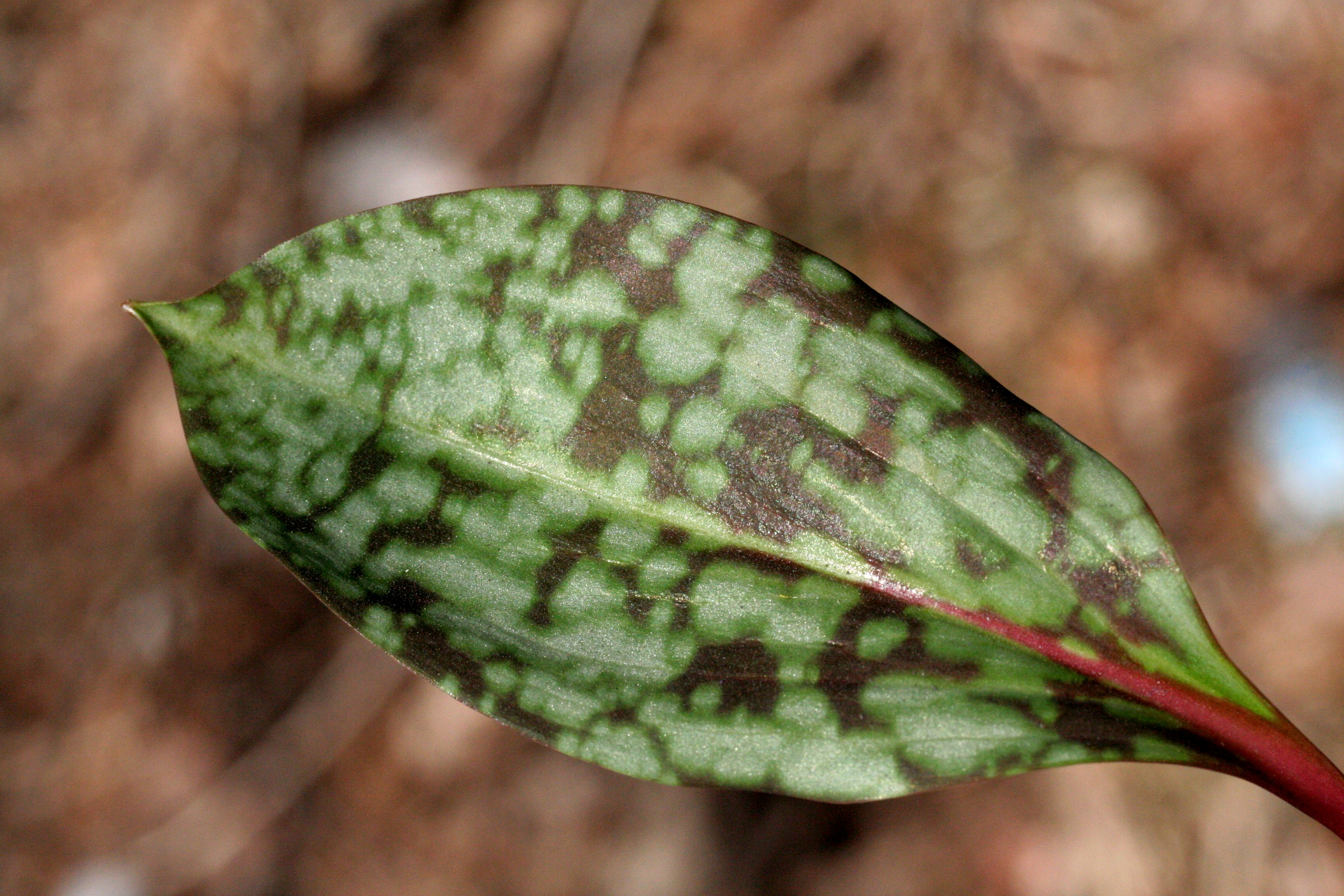 Erythronium_dens-canis (Dente di Cane) Località : Pasa, Sedico (BL), 356 m s.l.m.